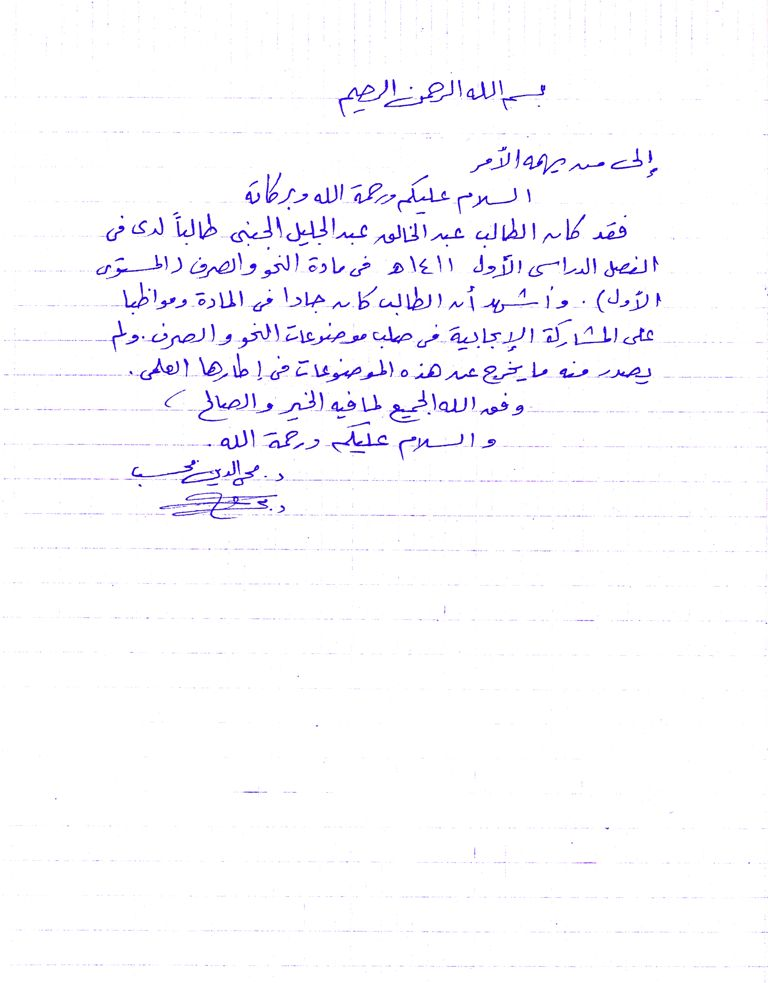 شهادة الدكتور محيي الدين محسب عضو هيئة التدريس بجامعة الملك عبد العزيز بجدة لتلميذه الجنبي.